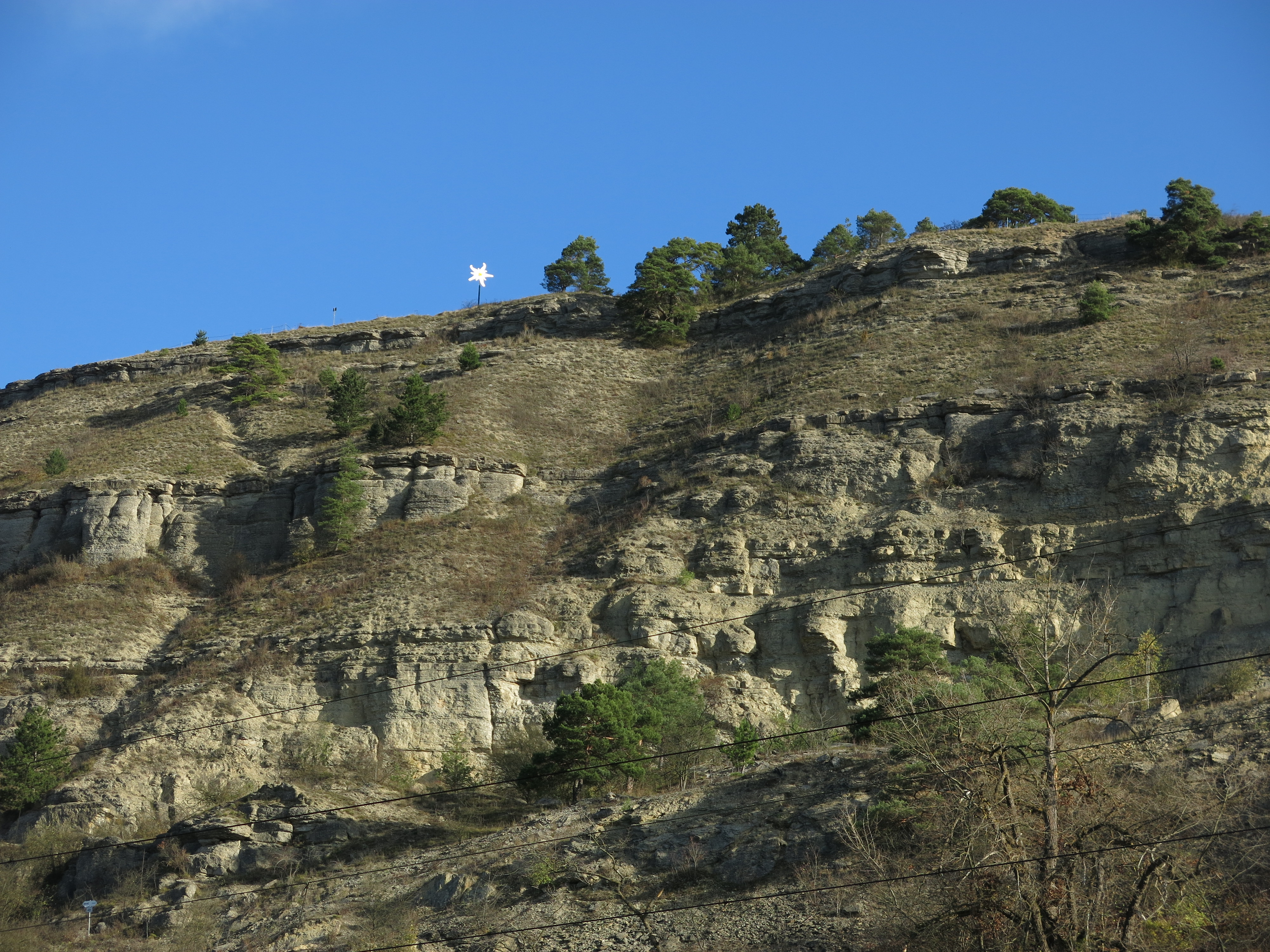 Blick vom Radweg entlang der Bahnlinie auf den Kalbenstein, NSG Grainberg-Kalbenstein und Saupurzel